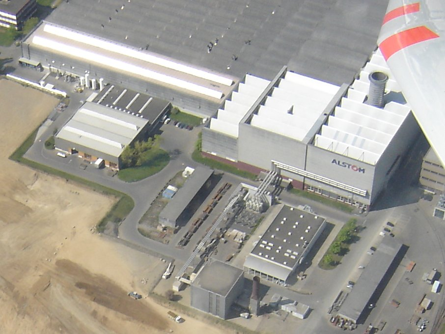 Alstom Fabrik in Birr